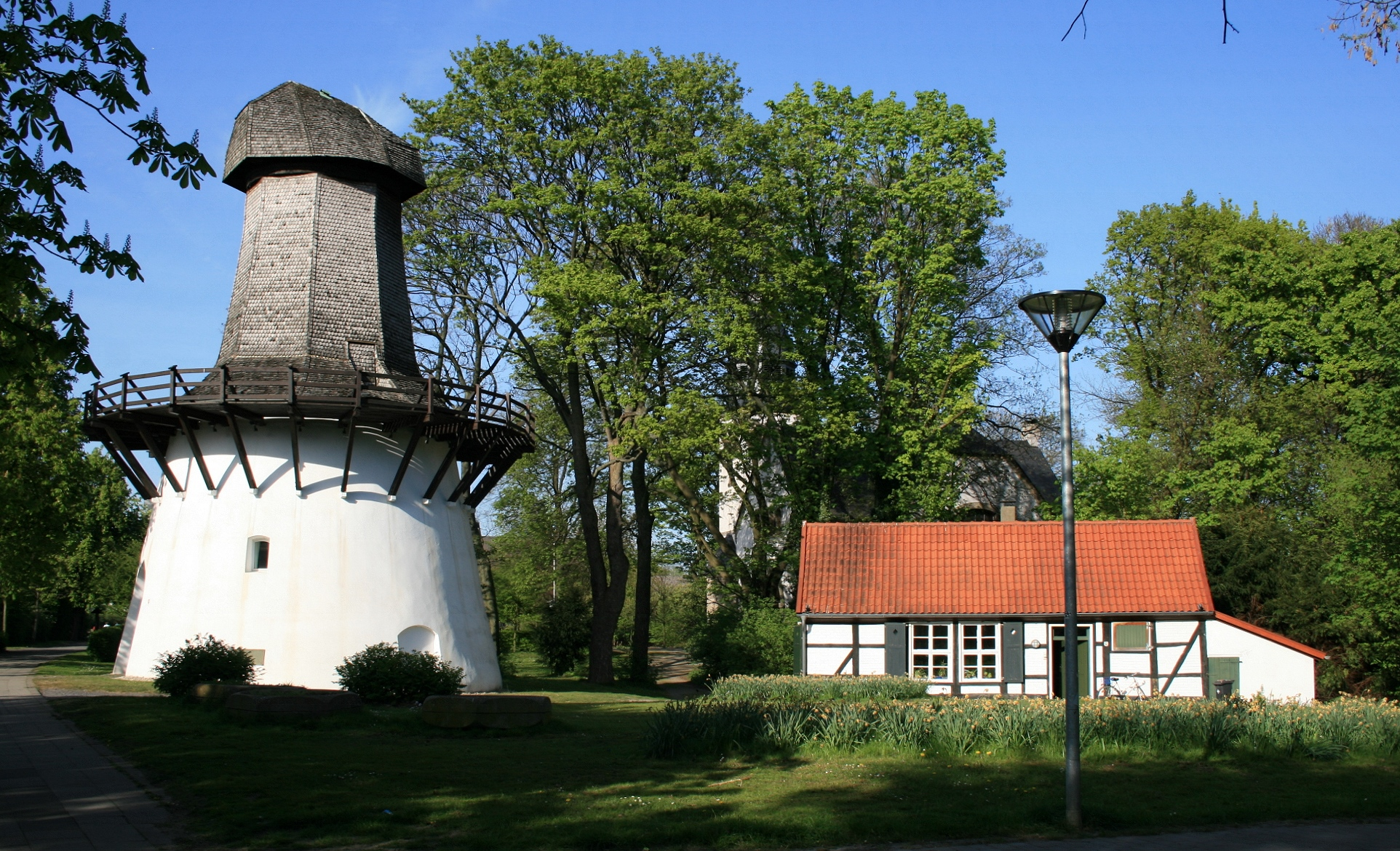 Ehemaliges Windpumpengebäude (erbaut 1750) mit Wärterhäuschen (Fachwerk) in Unna-Königsborn.